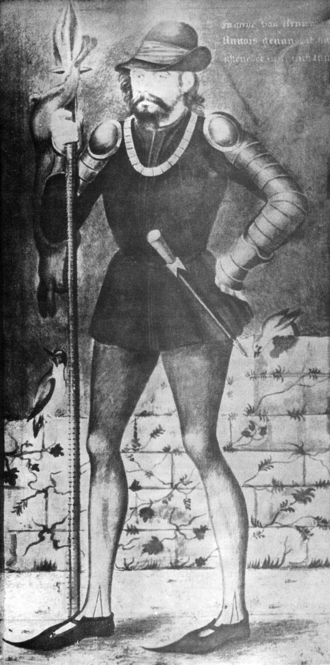 Bild von Annois Graf von Arnum auf Schloss Arensburg